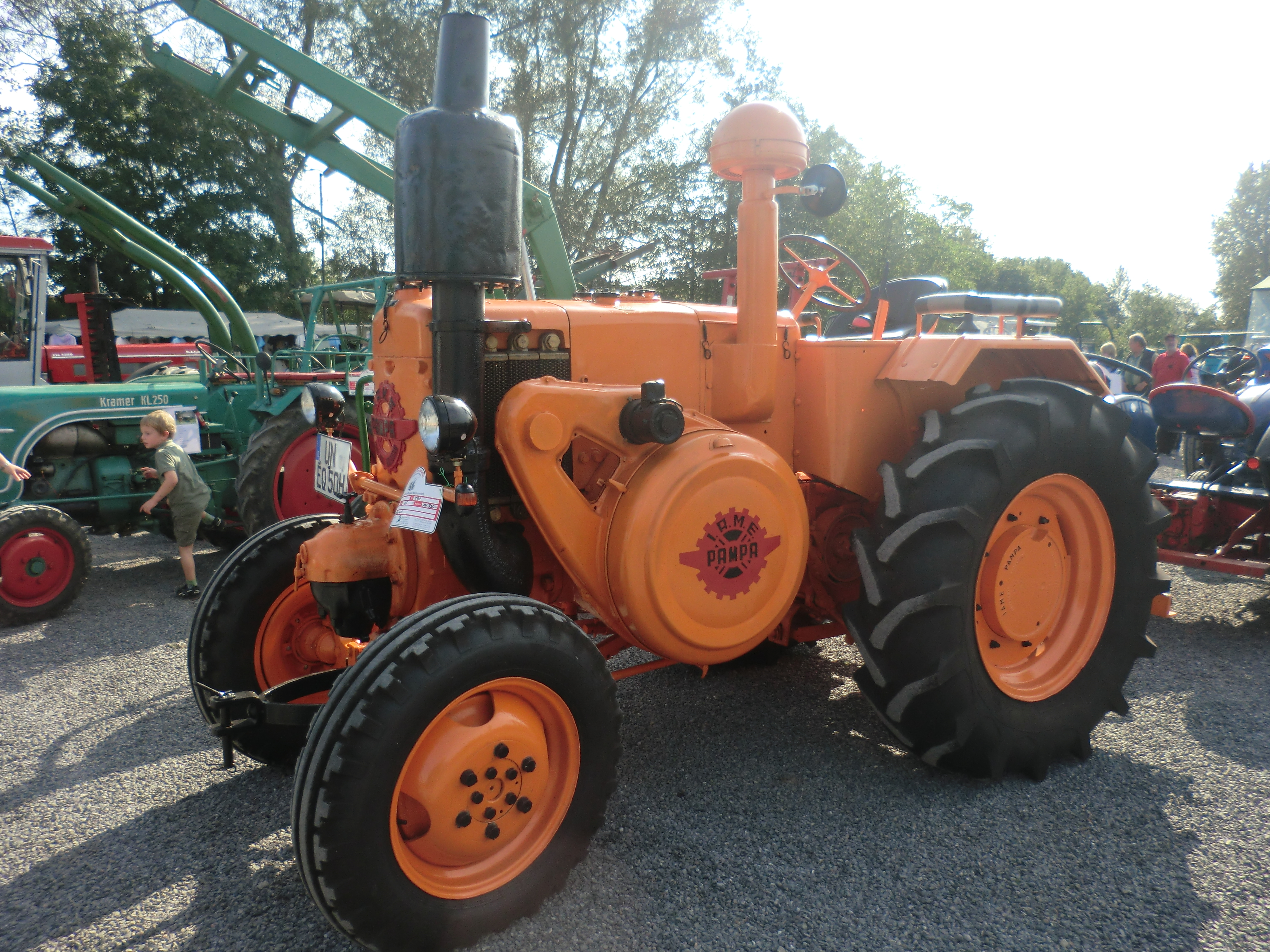 Orangefarbener Nachbau eines Lanz Bulldog der argentinischen Firma Pampa